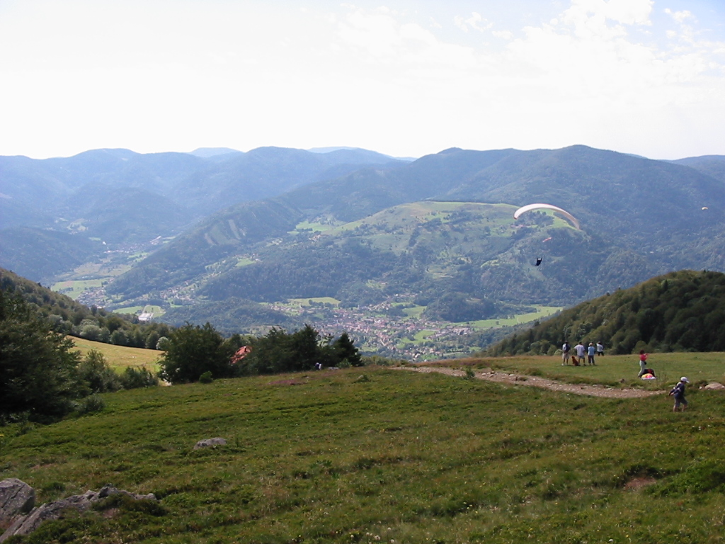 Le village d'Oderen, dans le Haut-Rhin, vu depuis le Trehkopf, piste d'envol des parapentistes.